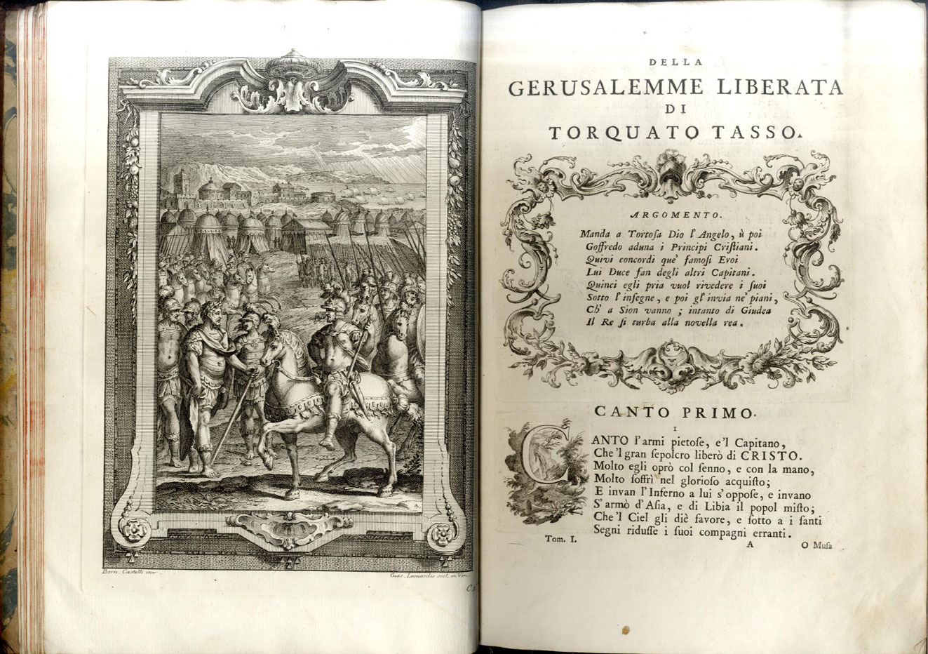 Torquato Tasso. Versione illustrata de La Gerusalemme liberata. Venezia: Antonio Groppo, 1761 (Primo canto)